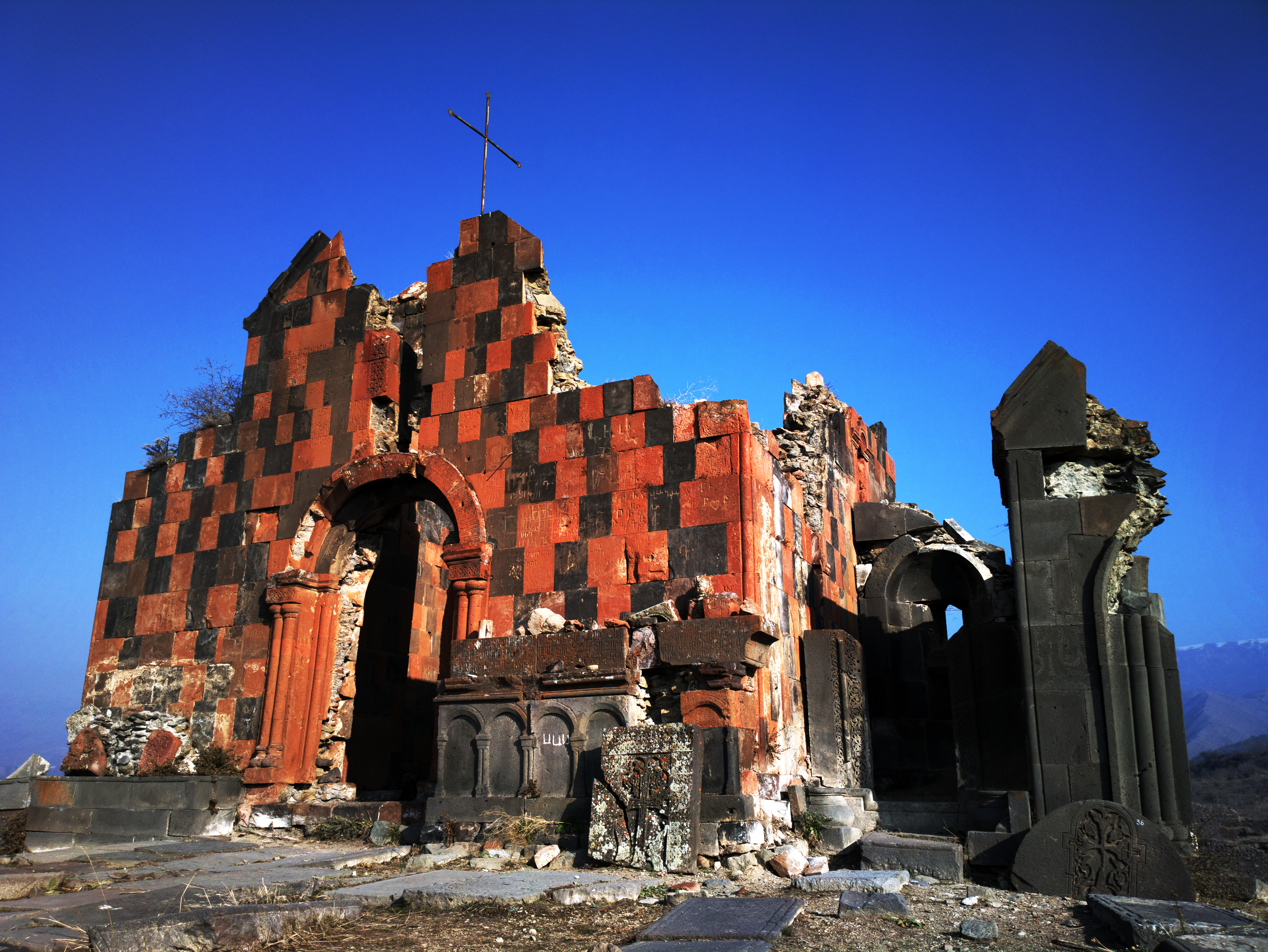 Հավուց Թառ վանքի Ամենափրկիչ եկեղեցին 99.4/3.1